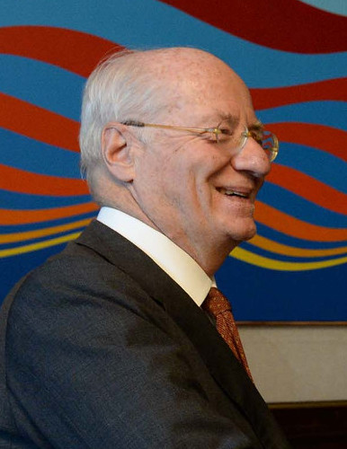 El presidente Mauricio Macri recibió en la Casa Rosada a Paolo Rocca, presidente y CEO del Grupo Techint, y a Carlos Ormachea, presidente y CEO de Tecpetrol, quienes le anunciaron una inversión de 2.300 millones de dólares en la primera fase del desarrollo de su área gasífera Fortín de Piedra, en Vaca Muerta, provincia de Neuquén, lo que generará 1.000 puestos de trabajo directo y otros 3.000 puestos de trabajo indirecto, según estimaron los empresarios.